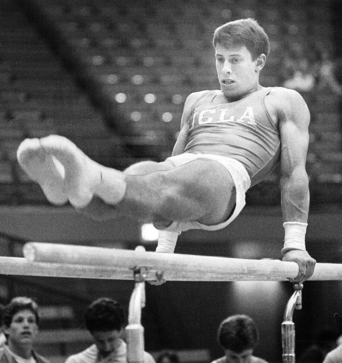 1984 Press Photo Tim Daggett